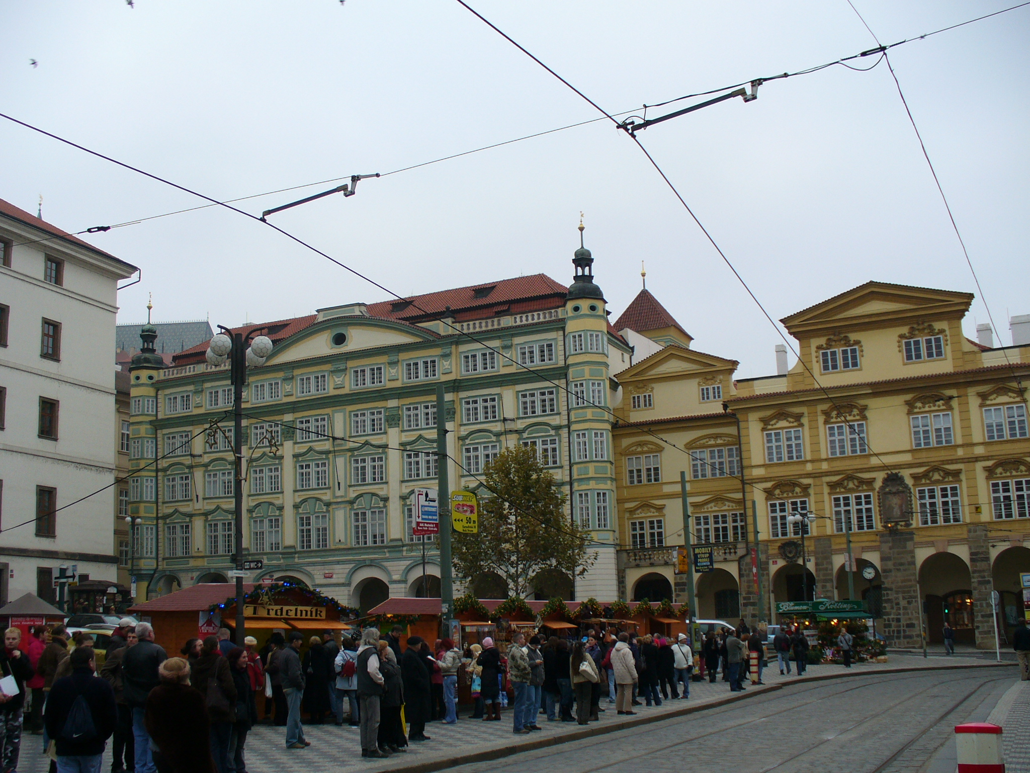 Praga. Mala Strana - Rynek